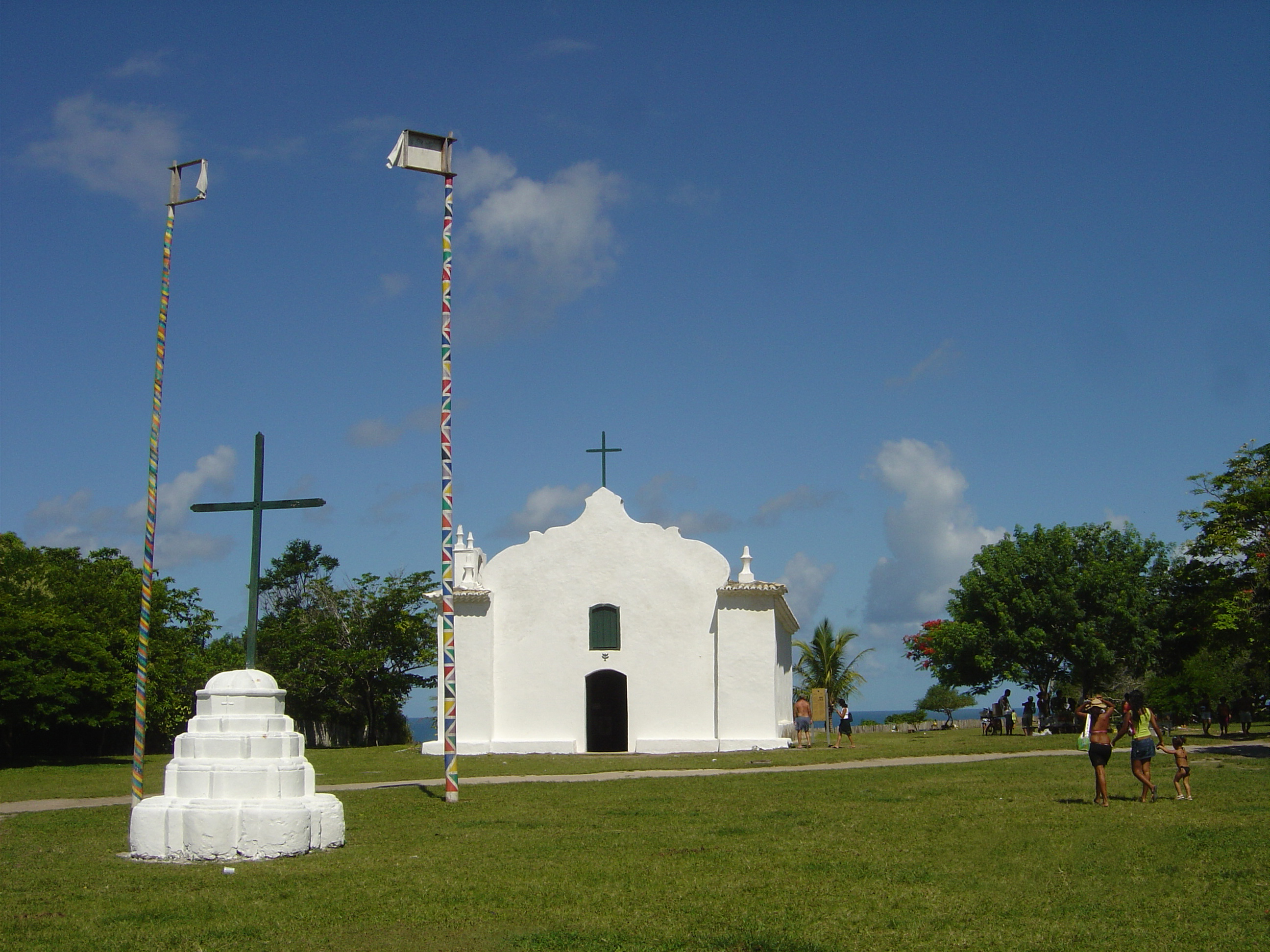 Vista da Praça do Quadrado, em Trancoso, Bahia, Brasil, com a igreja do século XVII